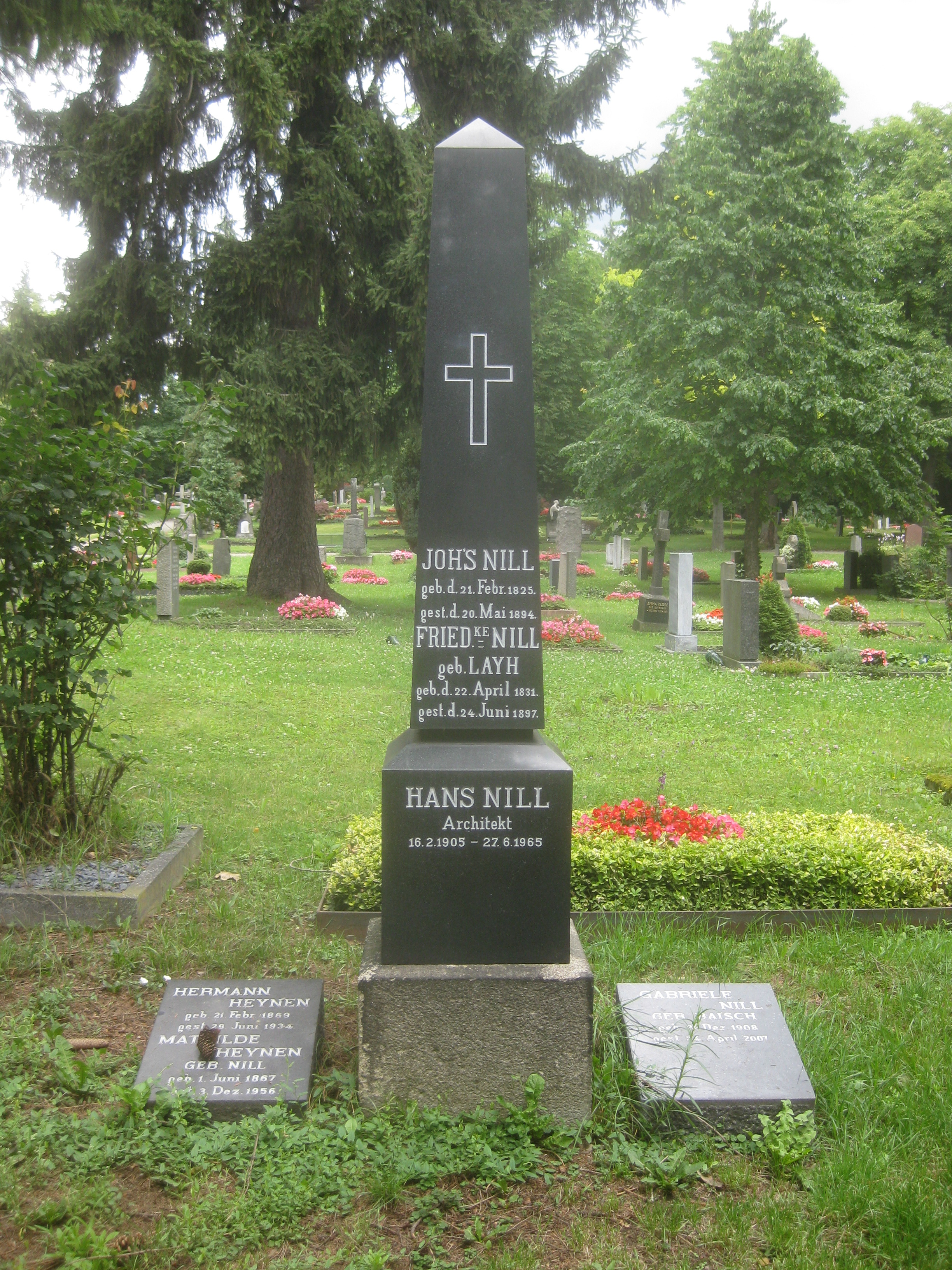 Grab von Johannes Nill, Gründer von Nills Tiergarten in Stuttgart, 1825–1894, und seinem Sohn Adolf Nill, Tierarzt und Besitzer von Nills Tiergarten in Stuttgart, 1861–1945, Stuttgart, Pragfriedhof, Abteilung 16.